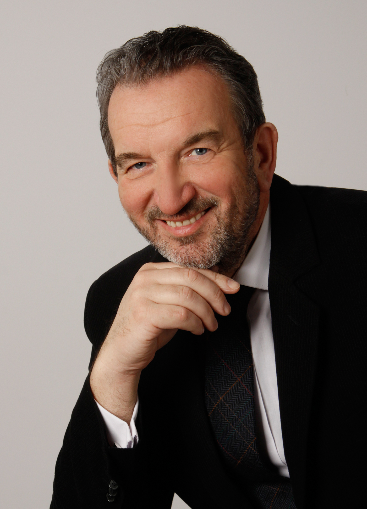 dr inż. Mieczysław S. Ostojski, prof. WSŚ.